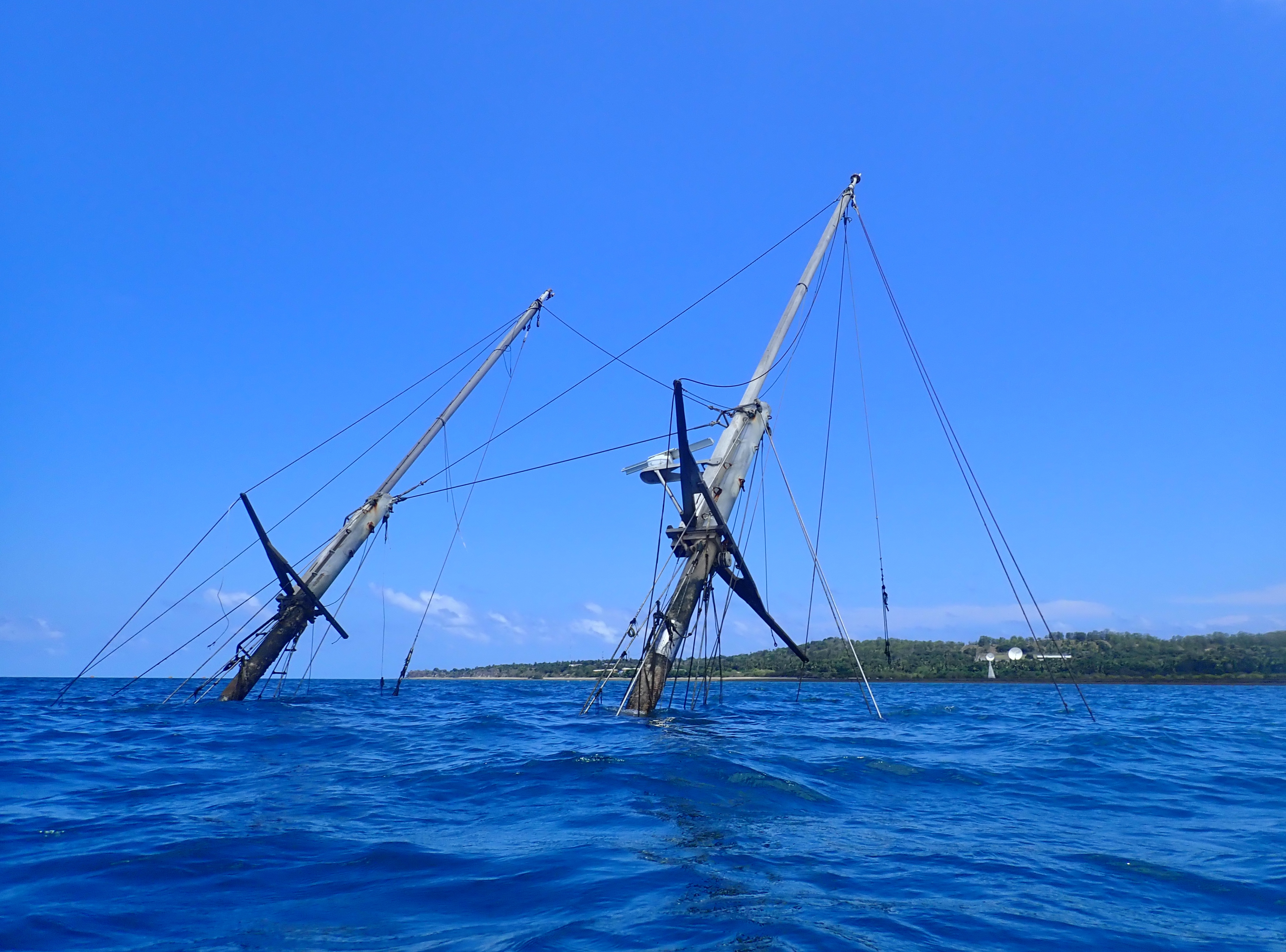 Les deux mâts de l'épave de la Dwyn Wen, voilier (schooner) échoué devant la plage des Badamiers à Mayotte.